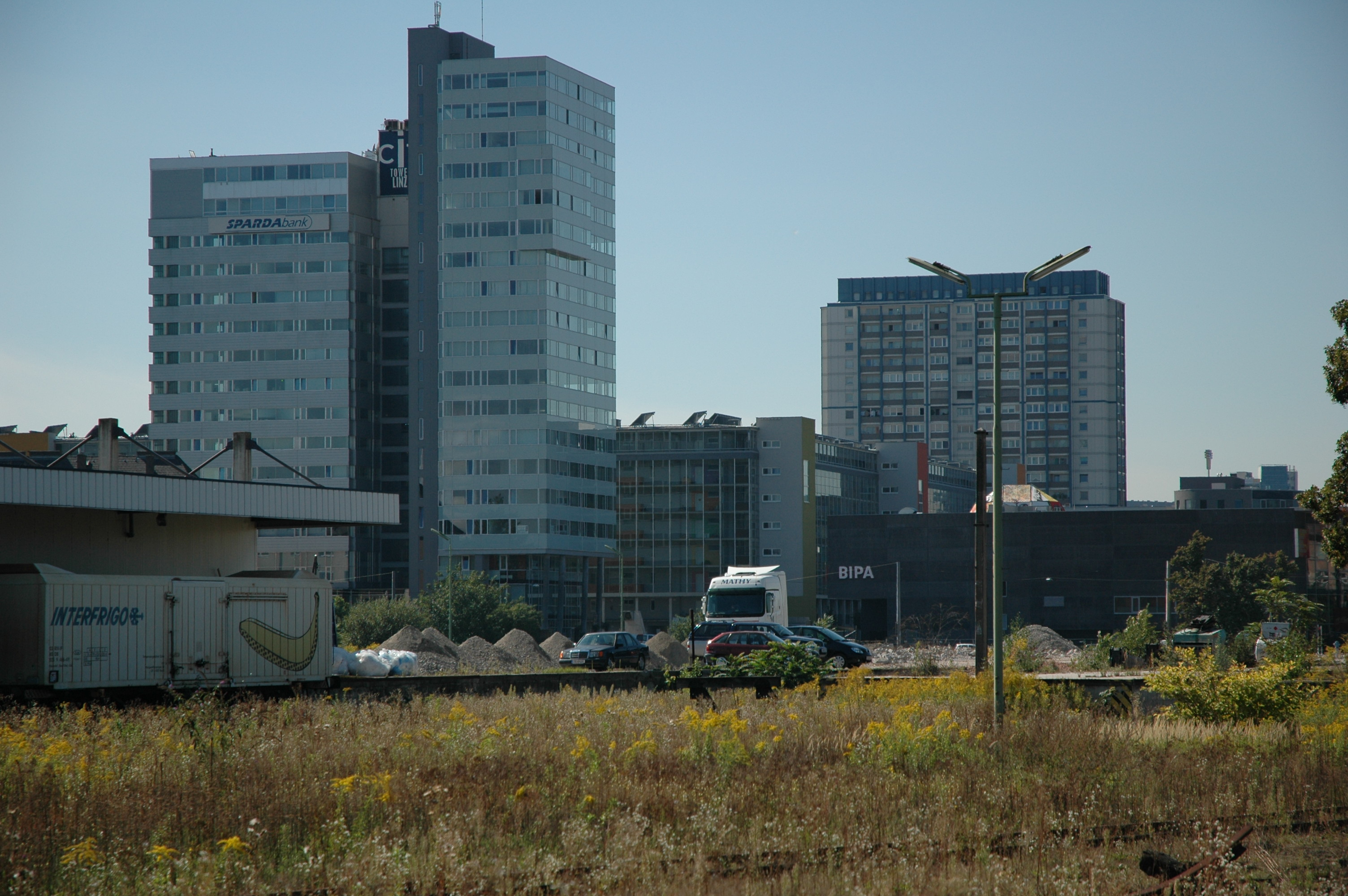 Blick vom Areal des abgerissenen Frachtenbahnhofs in Linz auf die beiden City Towers (1+2) des Wohn- und Gewerbekomplexes Lenaupark.